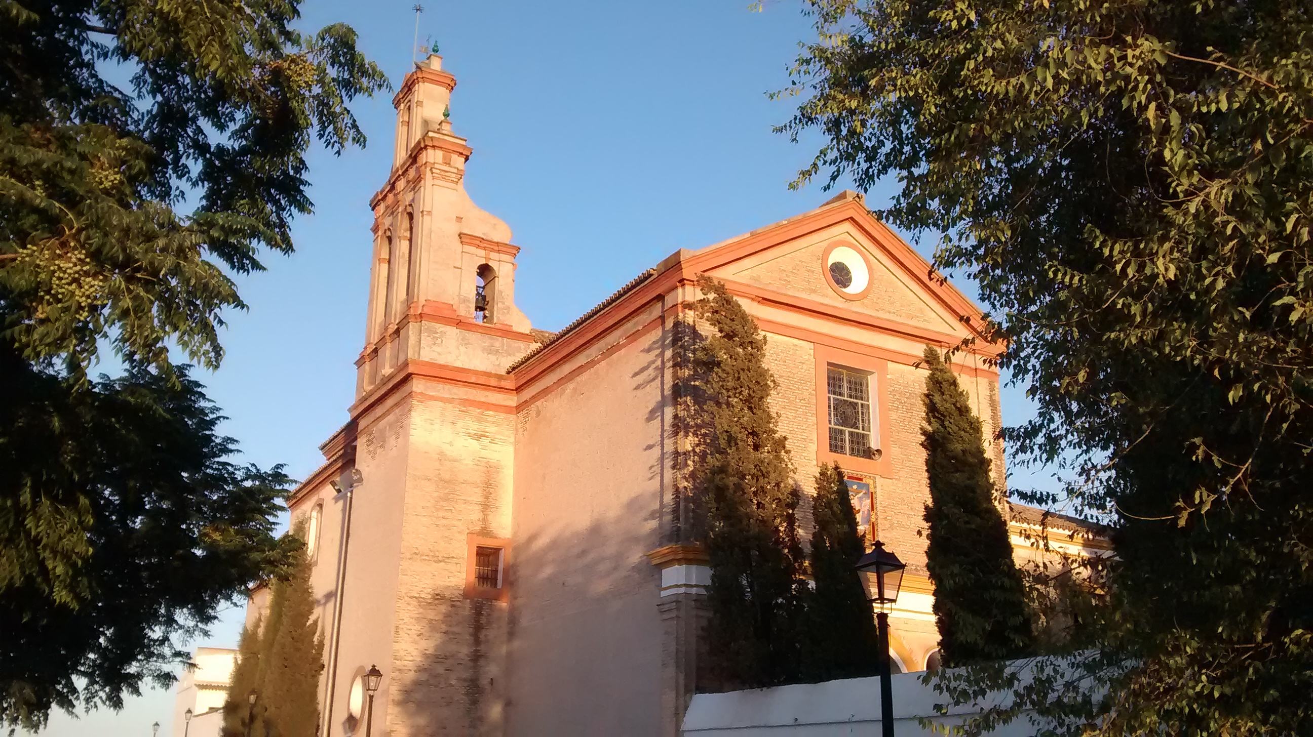 Monasterio de Ntra. Sra. del Loreto, Espartinas (Sevilla) - vista frontal Sra. del Loreto, Espartinas (Sevilla) - vista lateral.